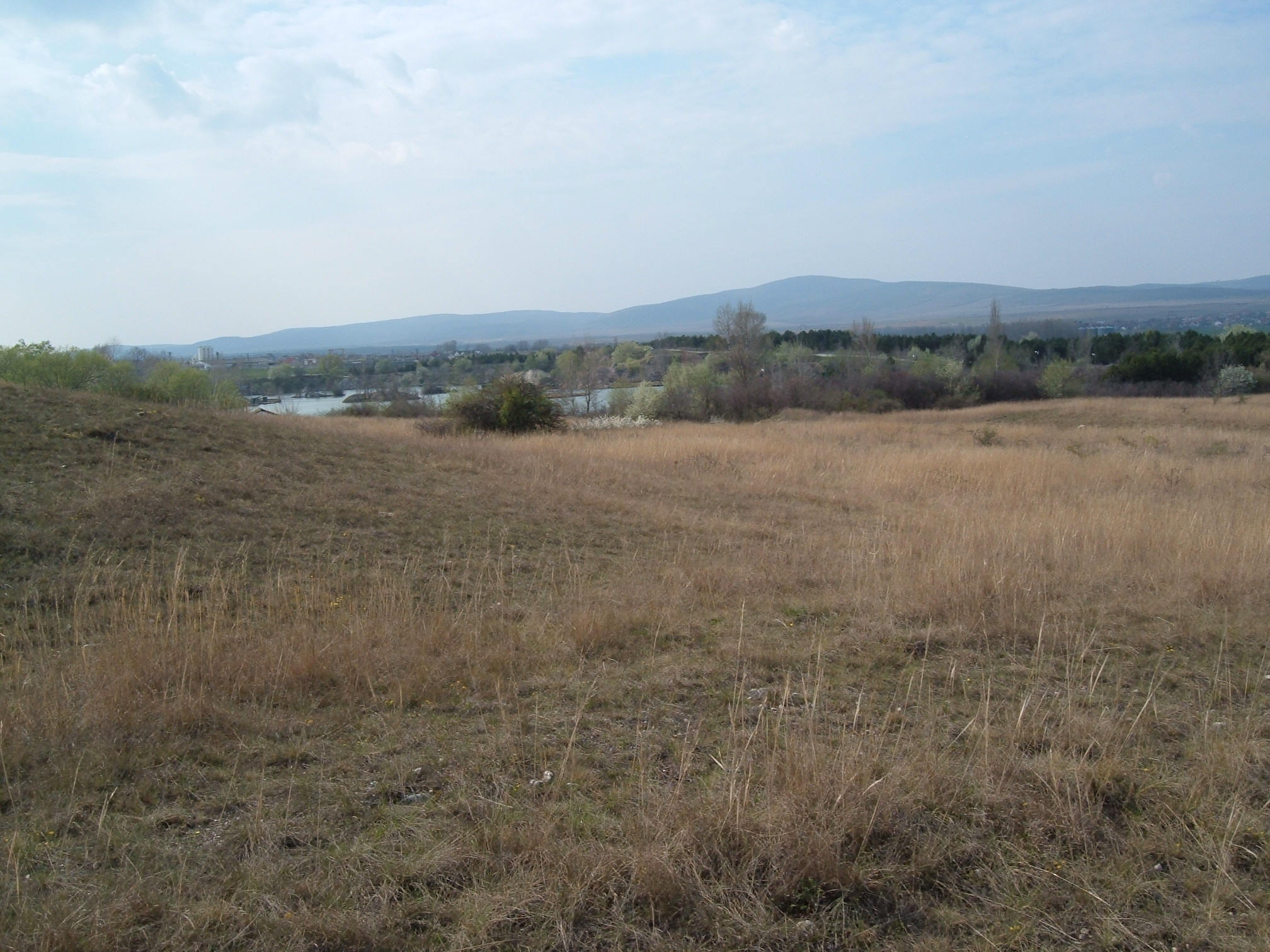 Geleméri-fennsík tavasszal, a távolban a kádártai halastóval